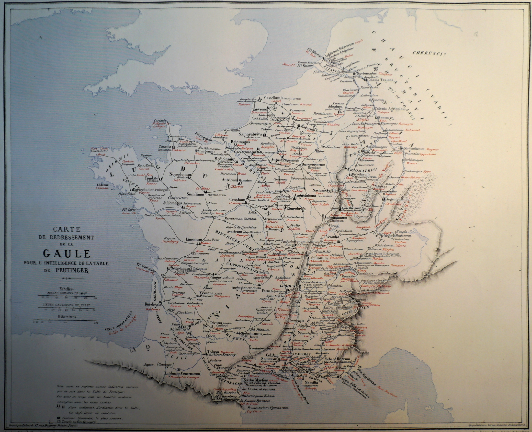 la carte de la Gaule avec les données de la carte de Peutinger projetée sur une carte modern par Desjardins.